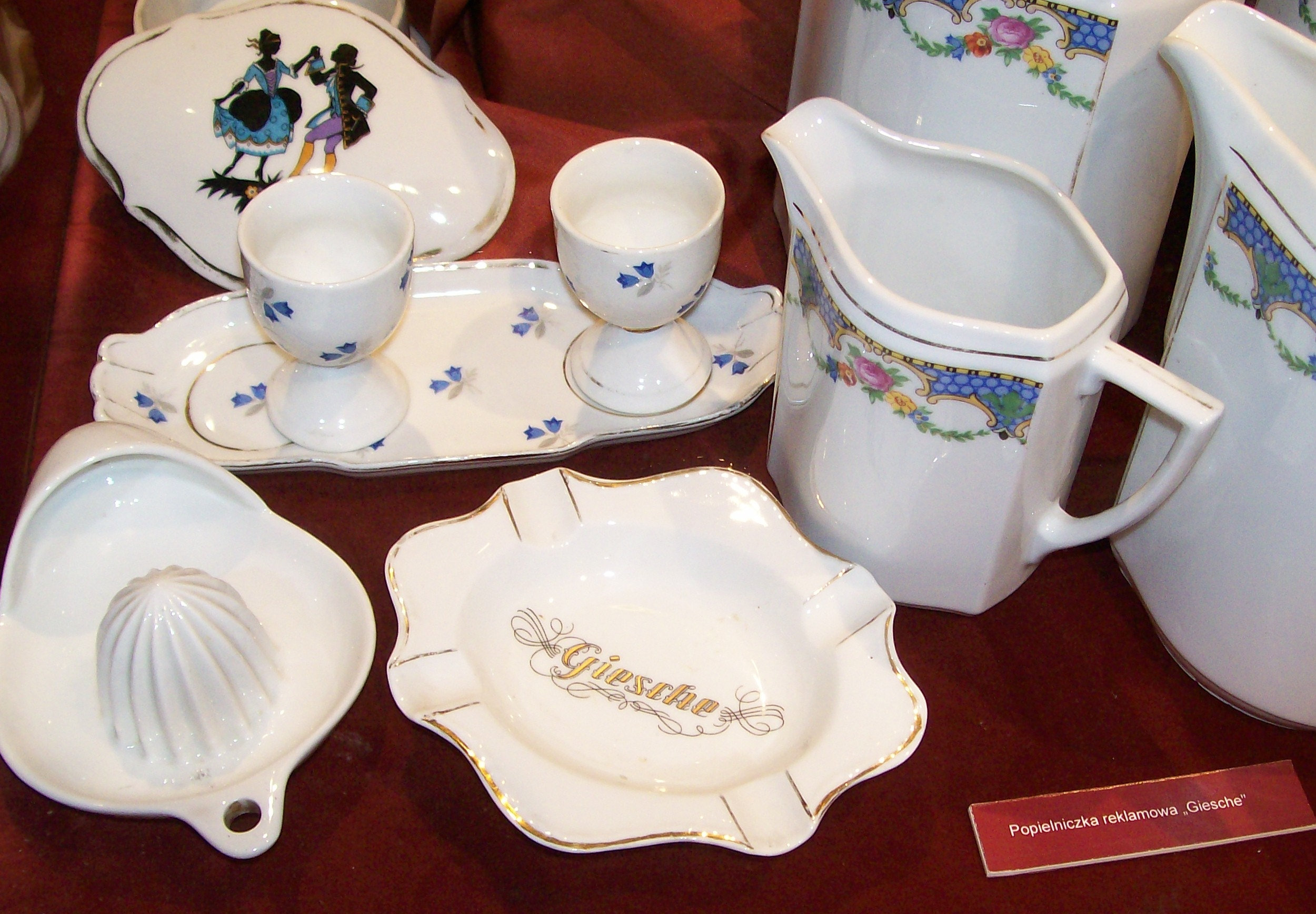 Popielniczka reklamowa Giesche.